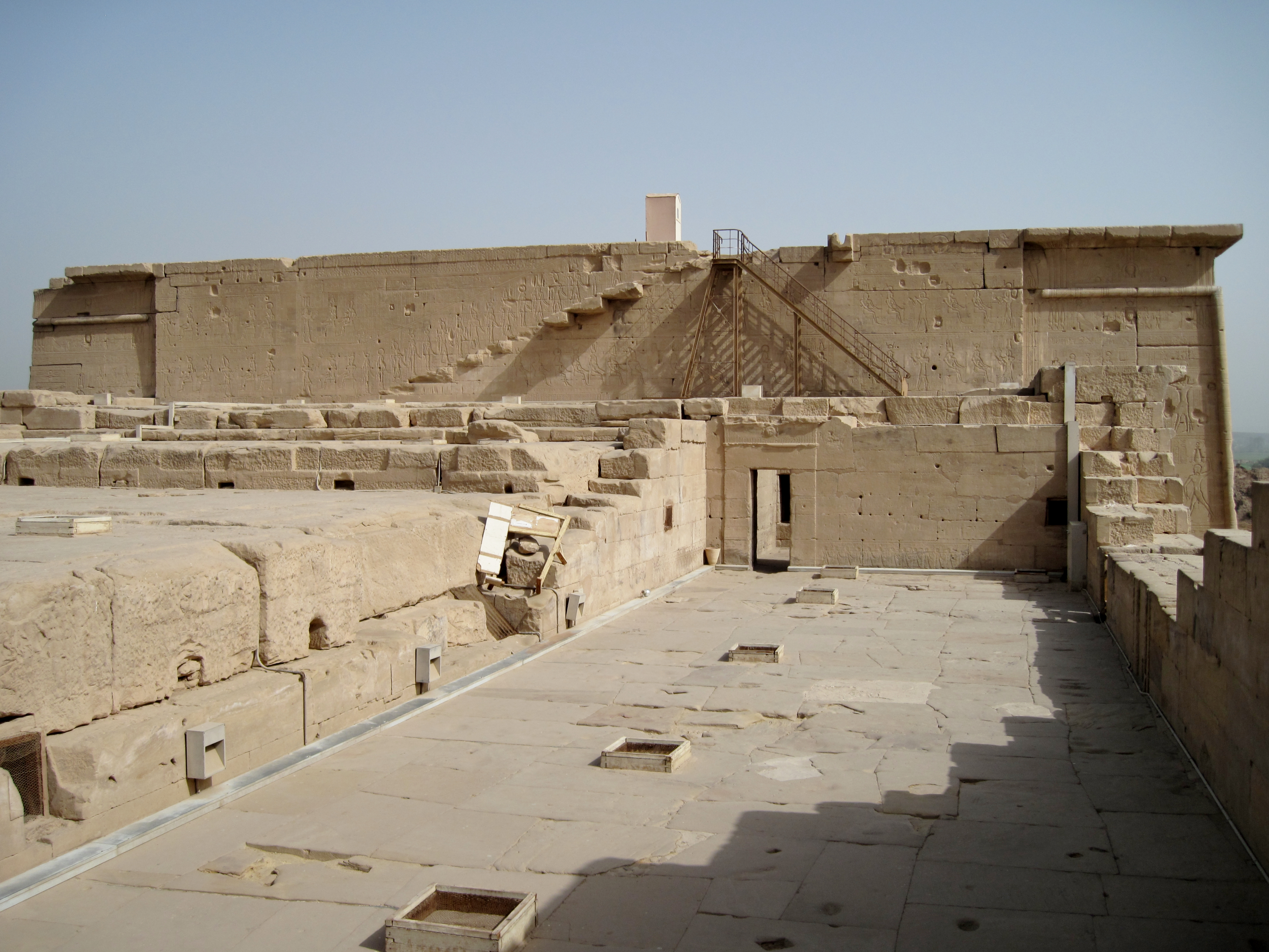 Dachgeschoss des Tempels von Dendera, Ägypten